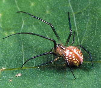 female Okileucauge sasakii from Okinawa.